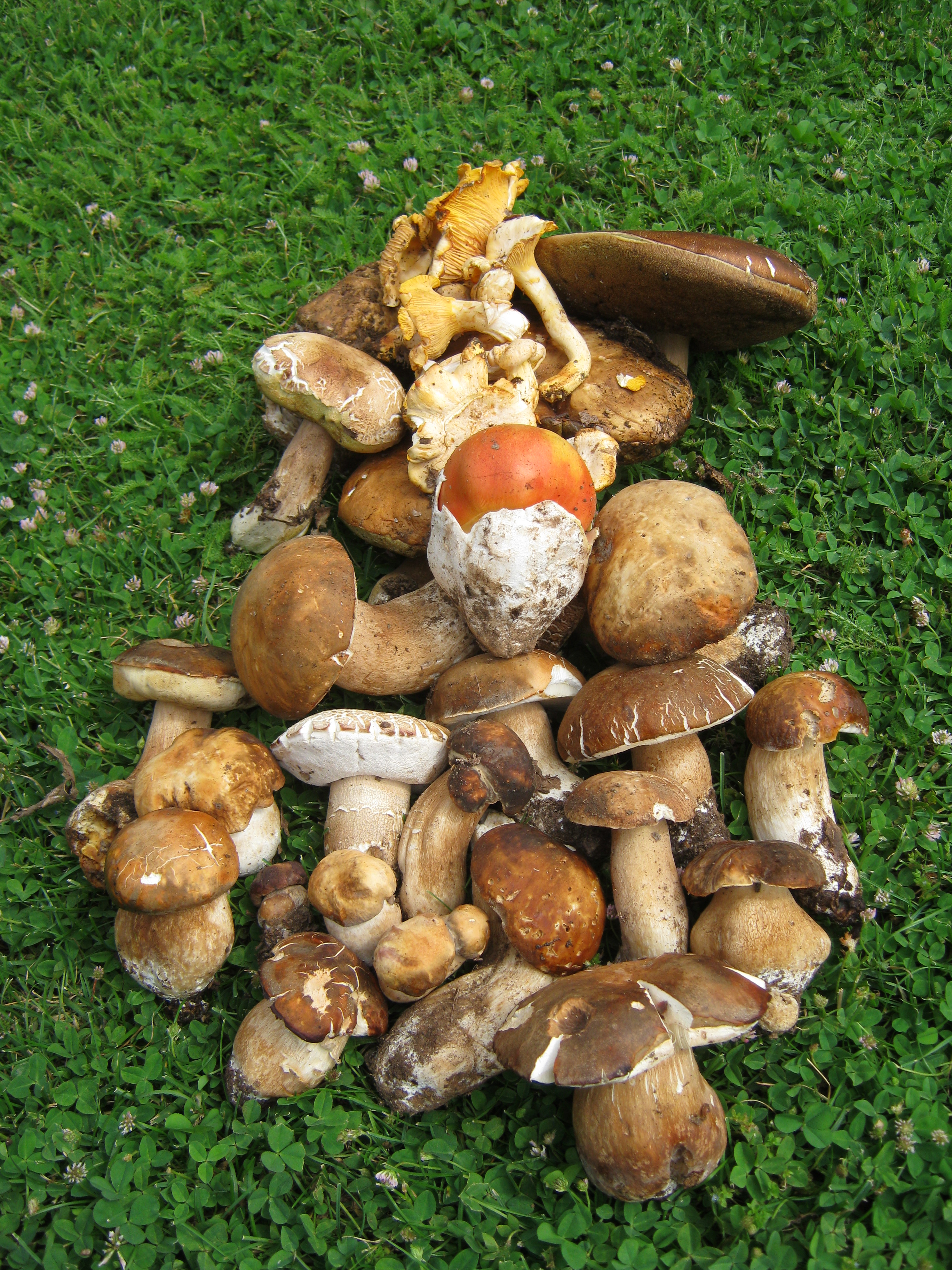 "Улов" дана. Влажна година погодовала је гљивама, које су изузетно укусне.